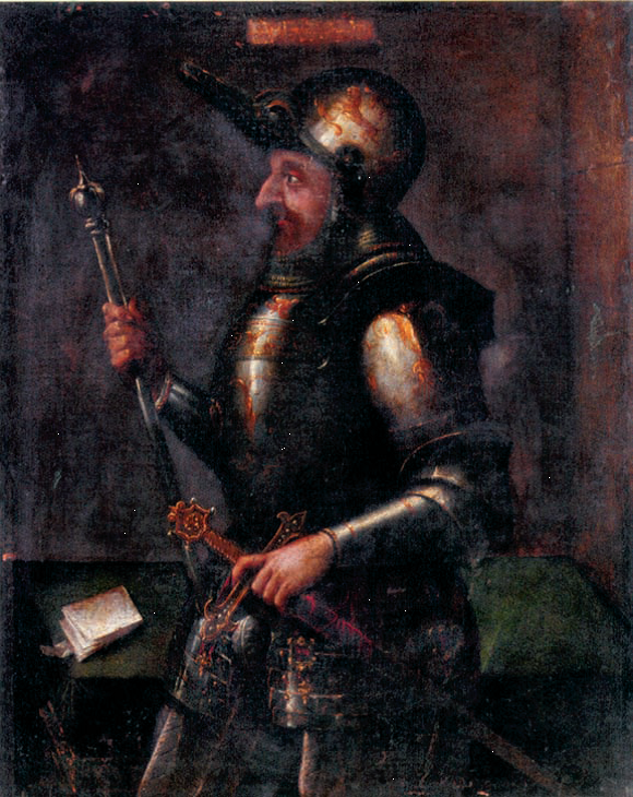 Ritratto di Ludovico I Gonzaga